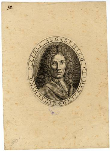 Incisione con ritratto di Gioacchino Pizzoli